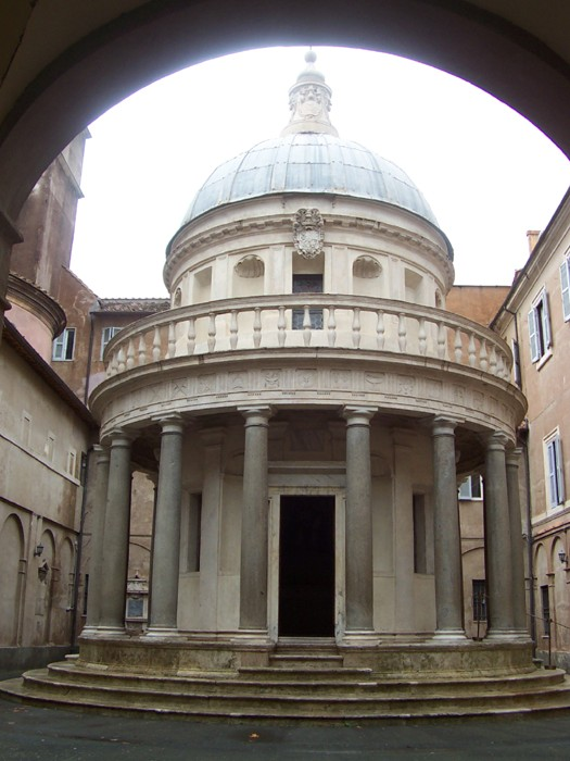 Roma - Tempietto del Bramante a S. Pietro in Montorio